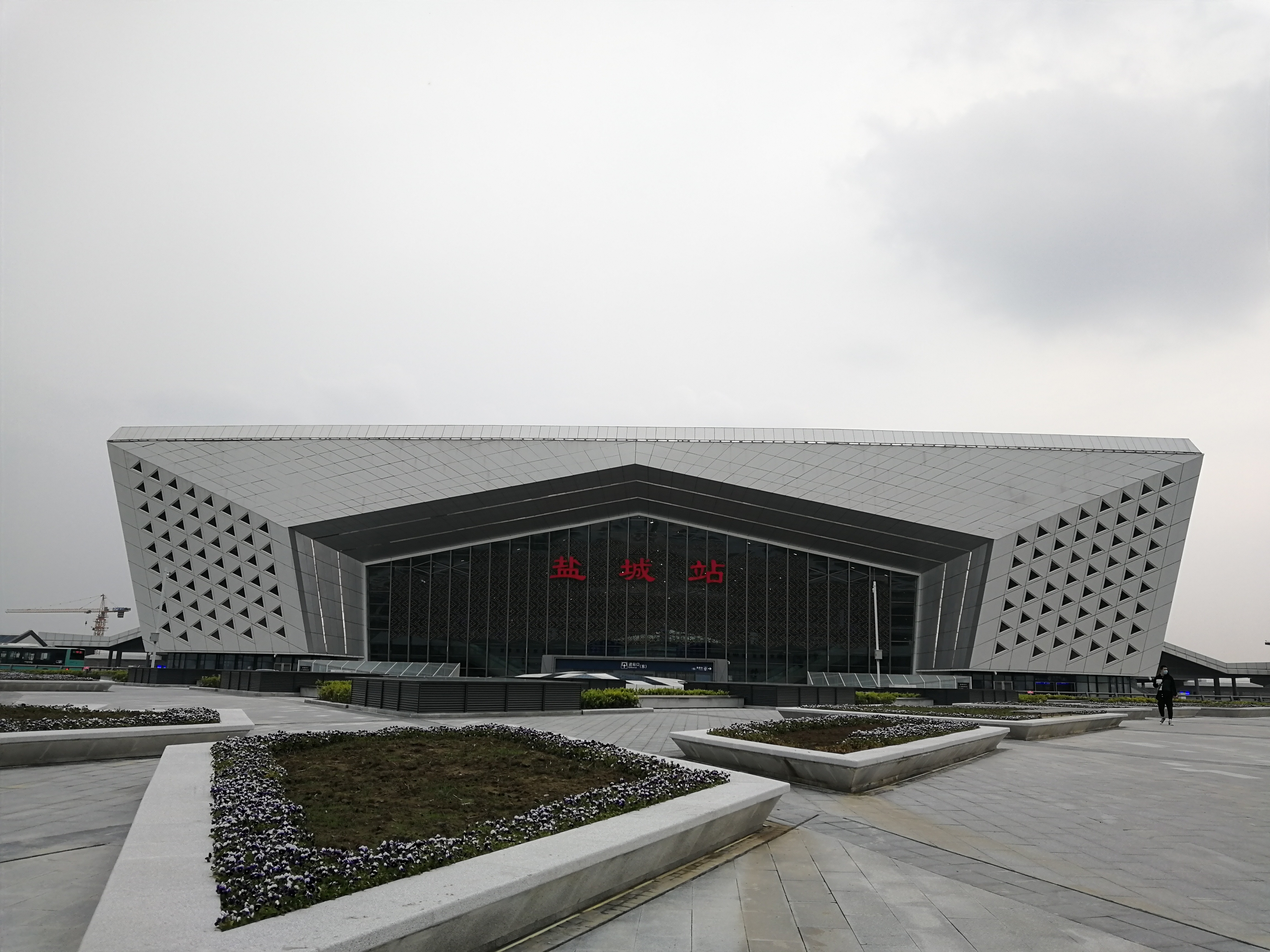 异地重建的盐城站新站房，于2019年12月15日开始使用